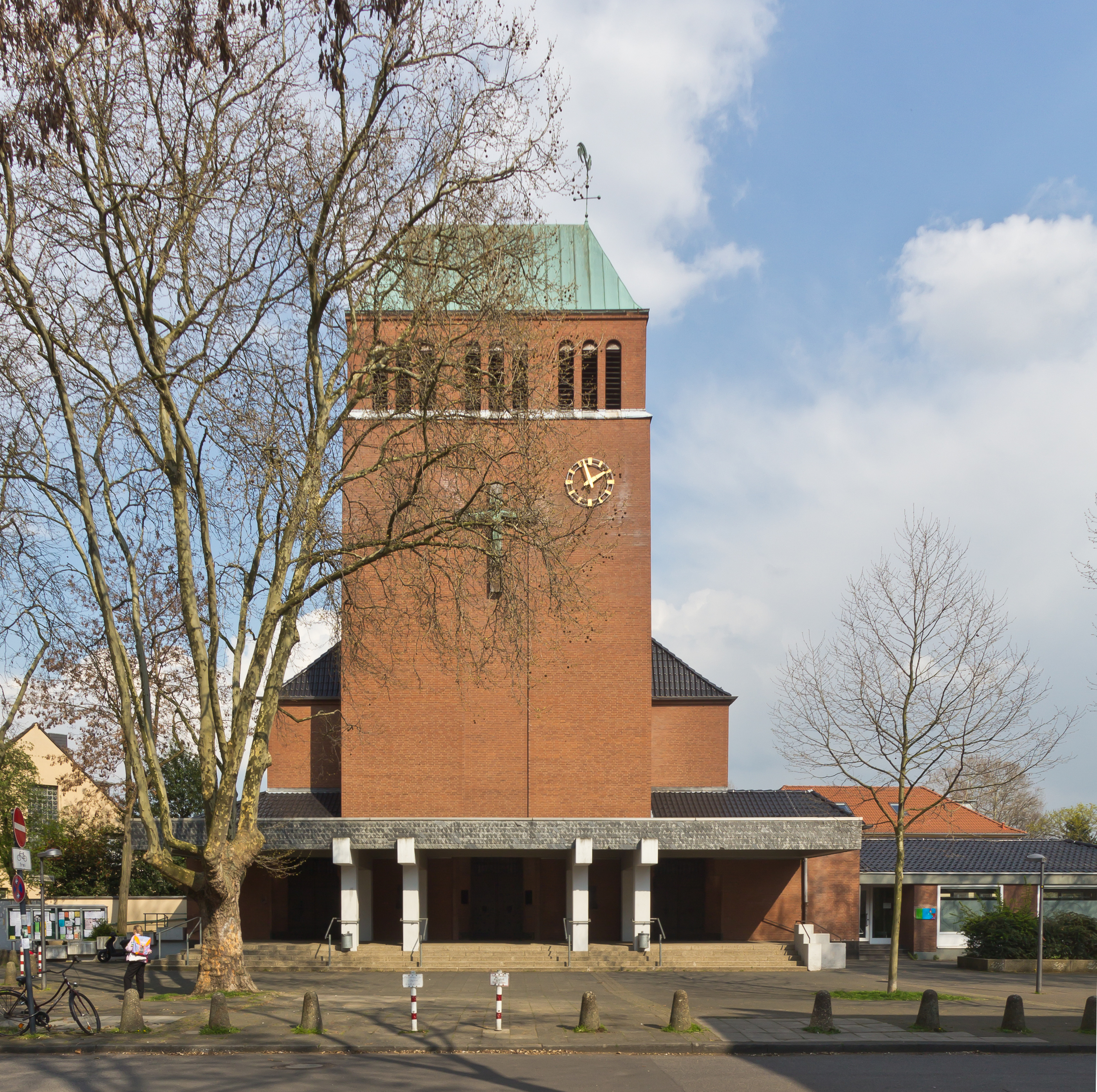 St. Barbara, Köln-Neuehrenfeld